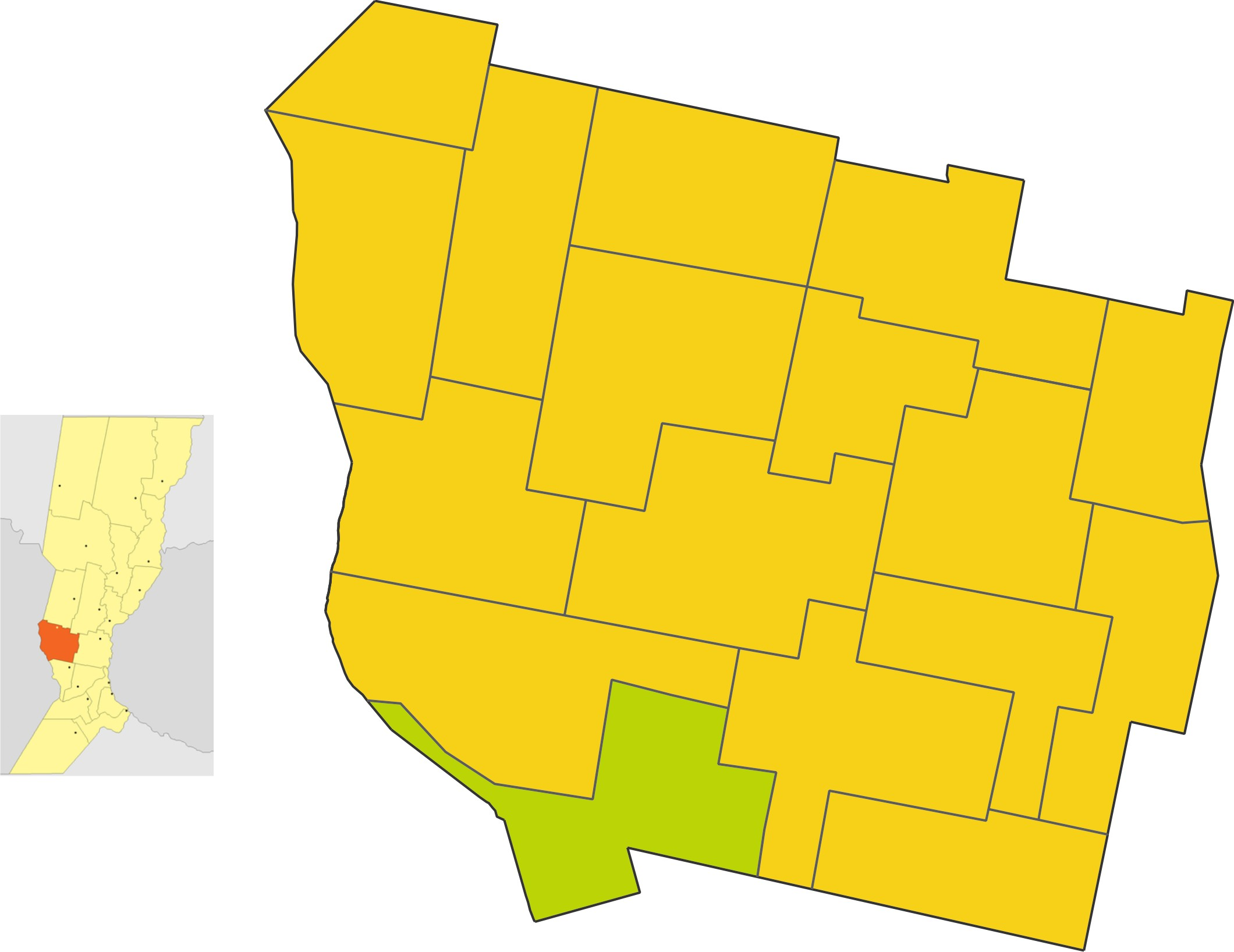 Map of the comuna de María Susana in San Martin department, Santa Fe province, Argentina